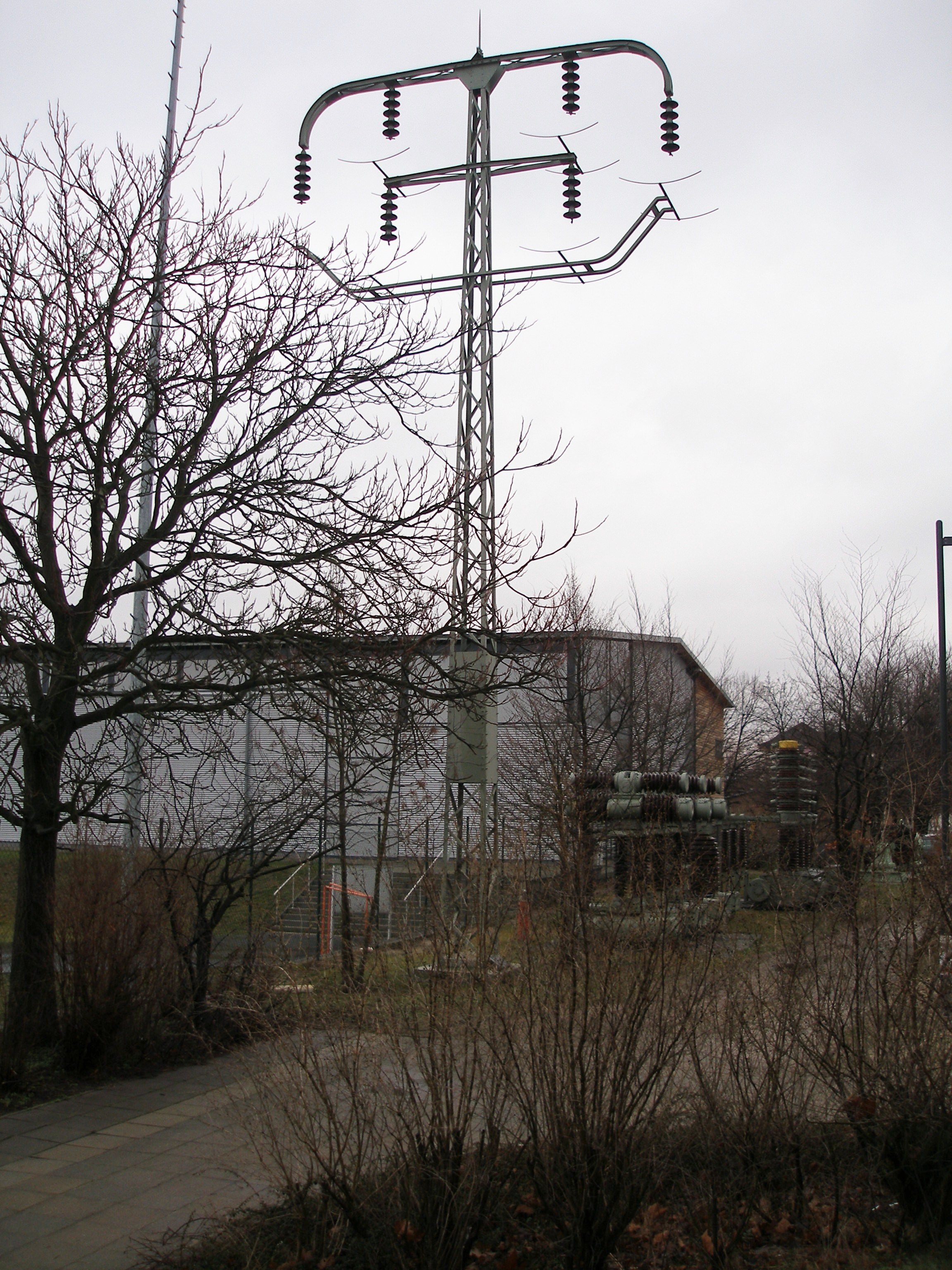 Denkmalgeschützter Tragmast der ersten 110-kV-Doppelfreileitung vom KW Lauchhammer der Lauchhammer AG zu den Schwesterwerken Gröditz und Riesa. Dieser Mast wurde 1996 in Lauchhammer durch die ESSAG (heute enviaM) demontiert und der Brandenburgischen Technischen Universität übergeben.